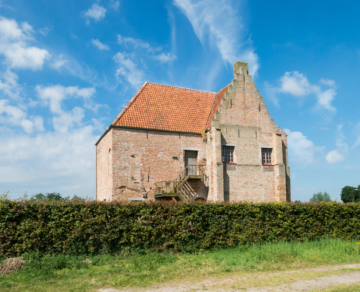 Onroerend erfgoed in Waarschoot